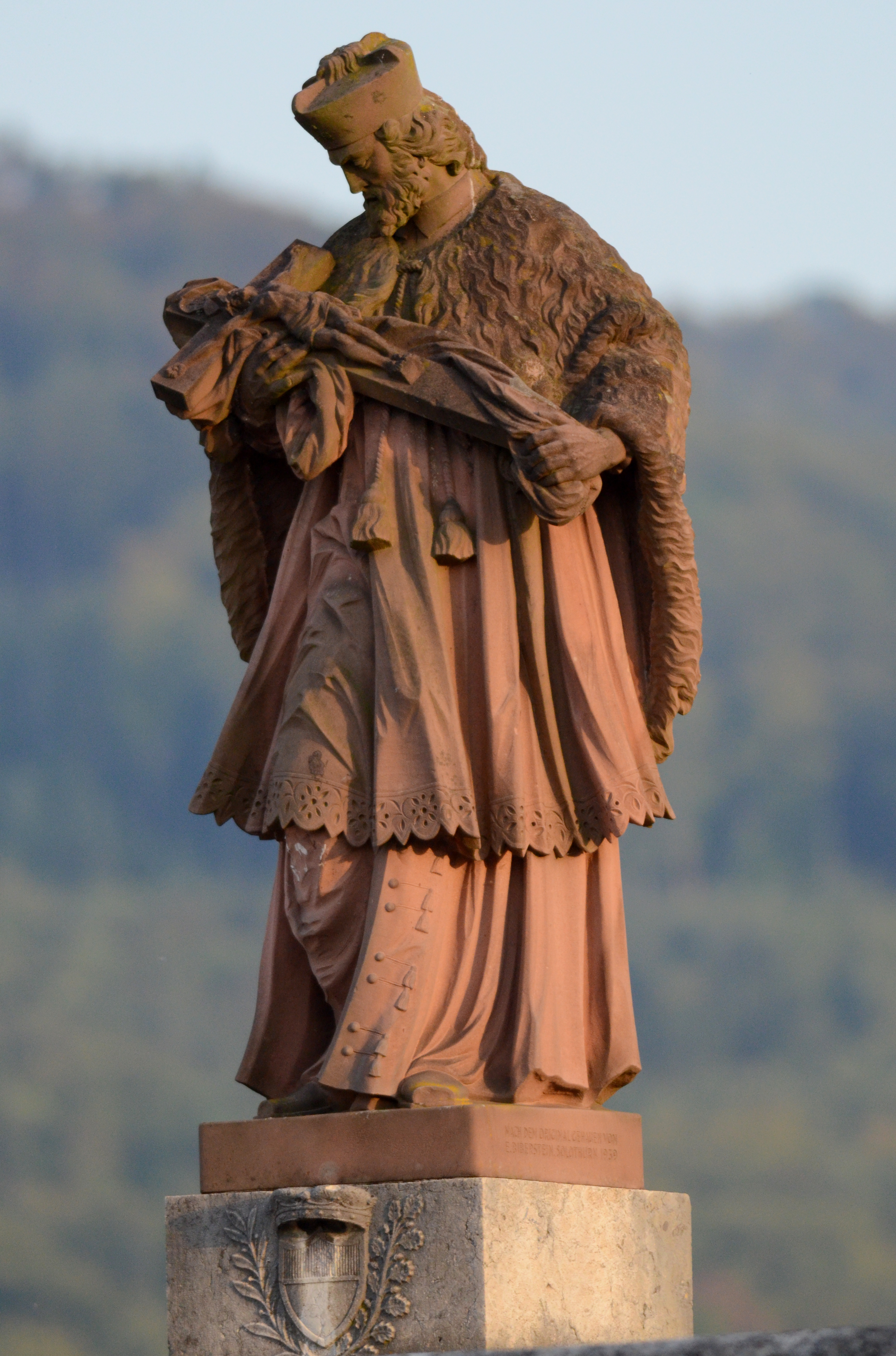 Statue of Nepomuk in Dornach, Switzerland